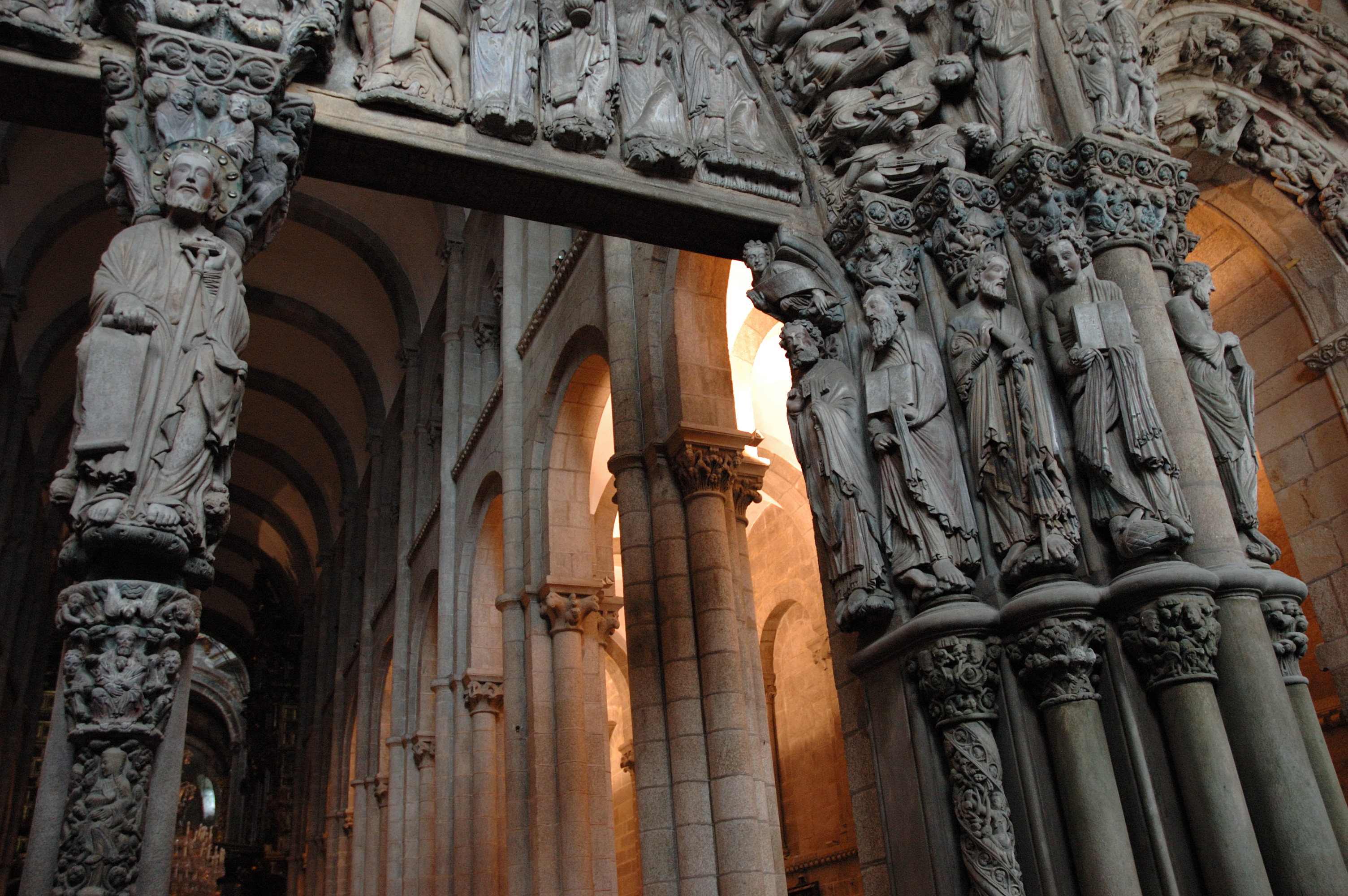 Foto del interior de la Catedral de Santiago de Compostela, Eduardo De Riquer